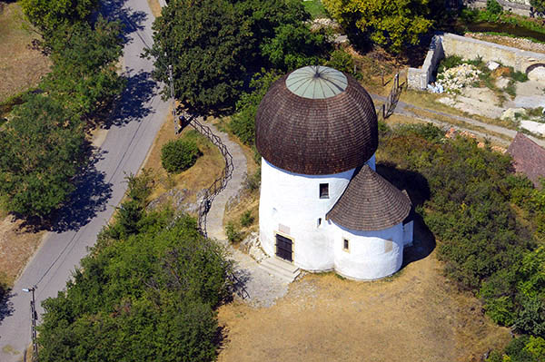 Kerektemplom, Öskü